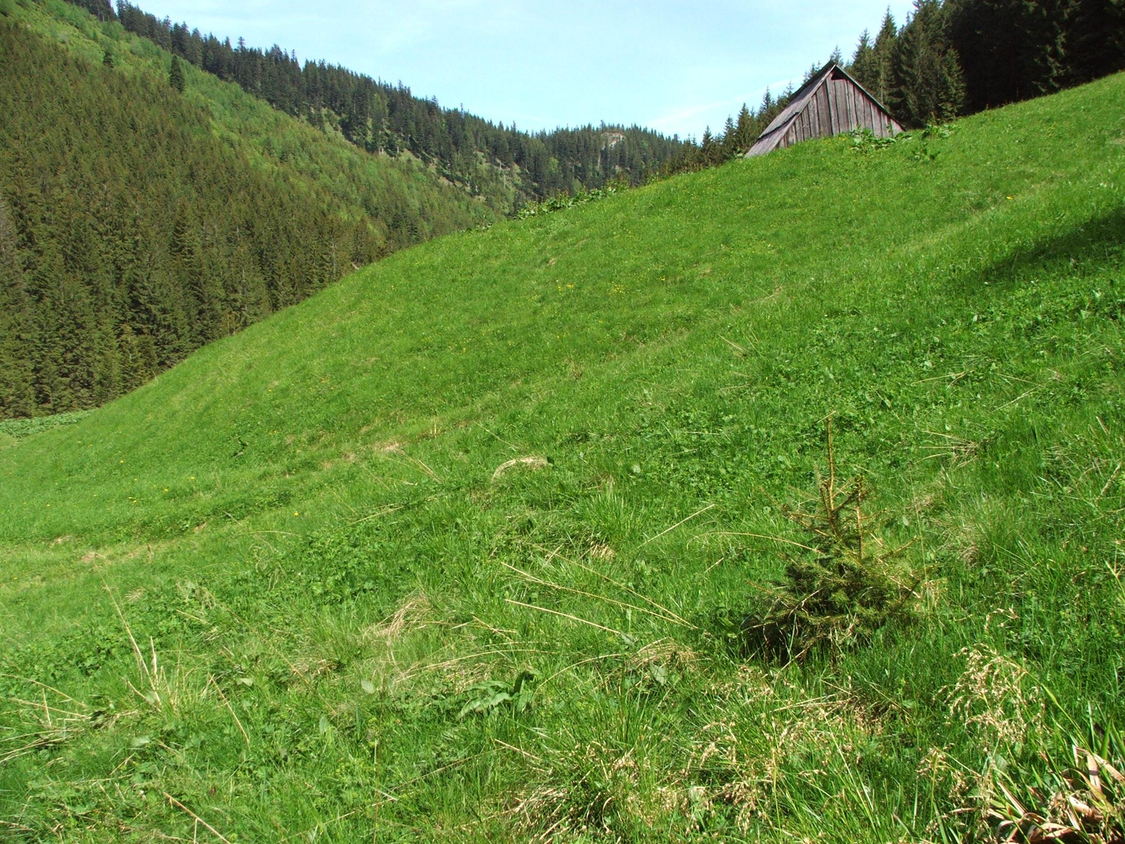 Polana Huty Lejowe (Tatra Mountains, Dolina Lejowa)